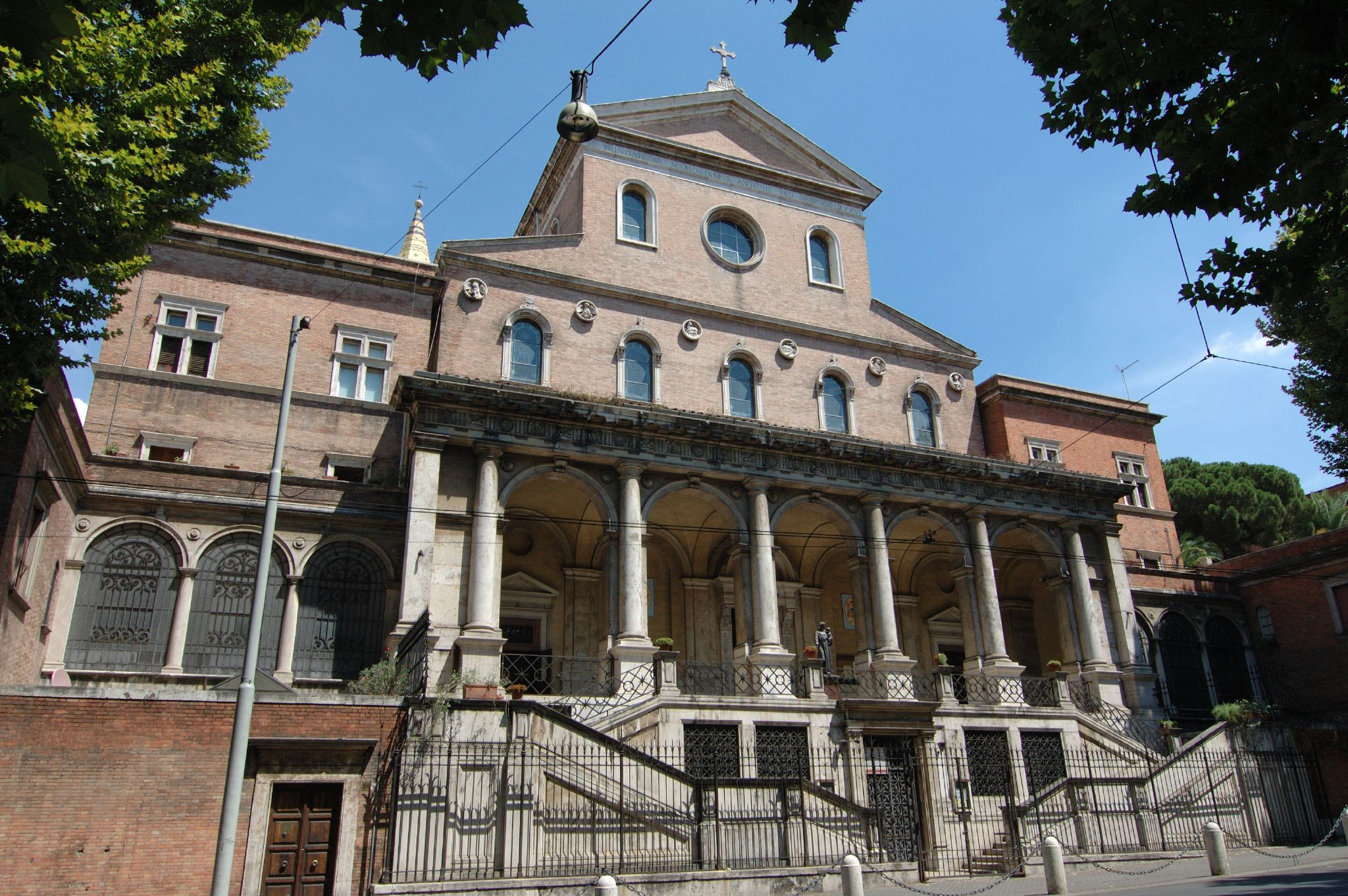 Esterno della chiesa di Sant'Antonio da Padova, a Roma, nel quartiere Esquilino.